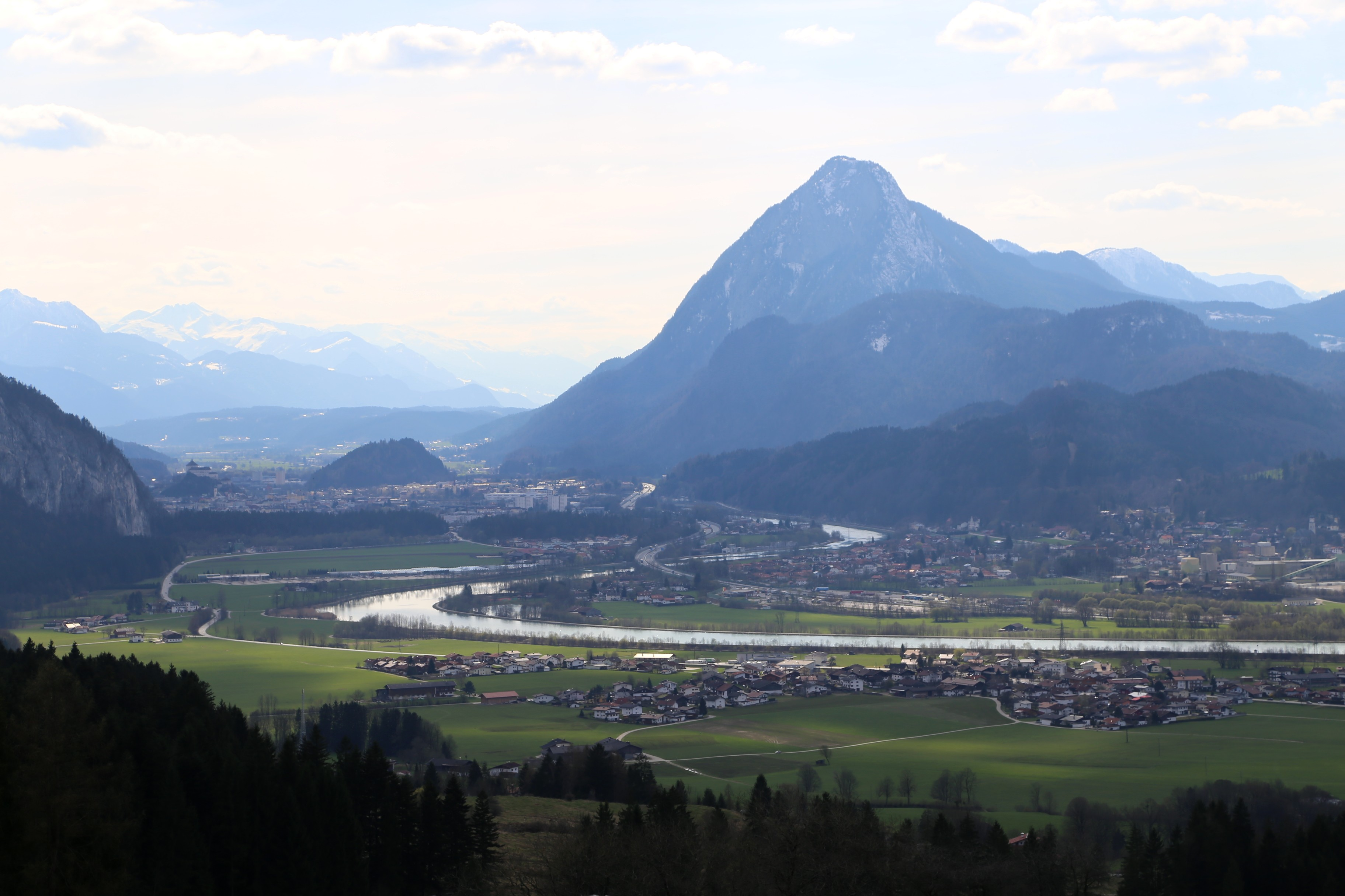 Das Inntal bei Kufstein mit dem Pendling; gesehen von St. Nikolaus, Ebbs